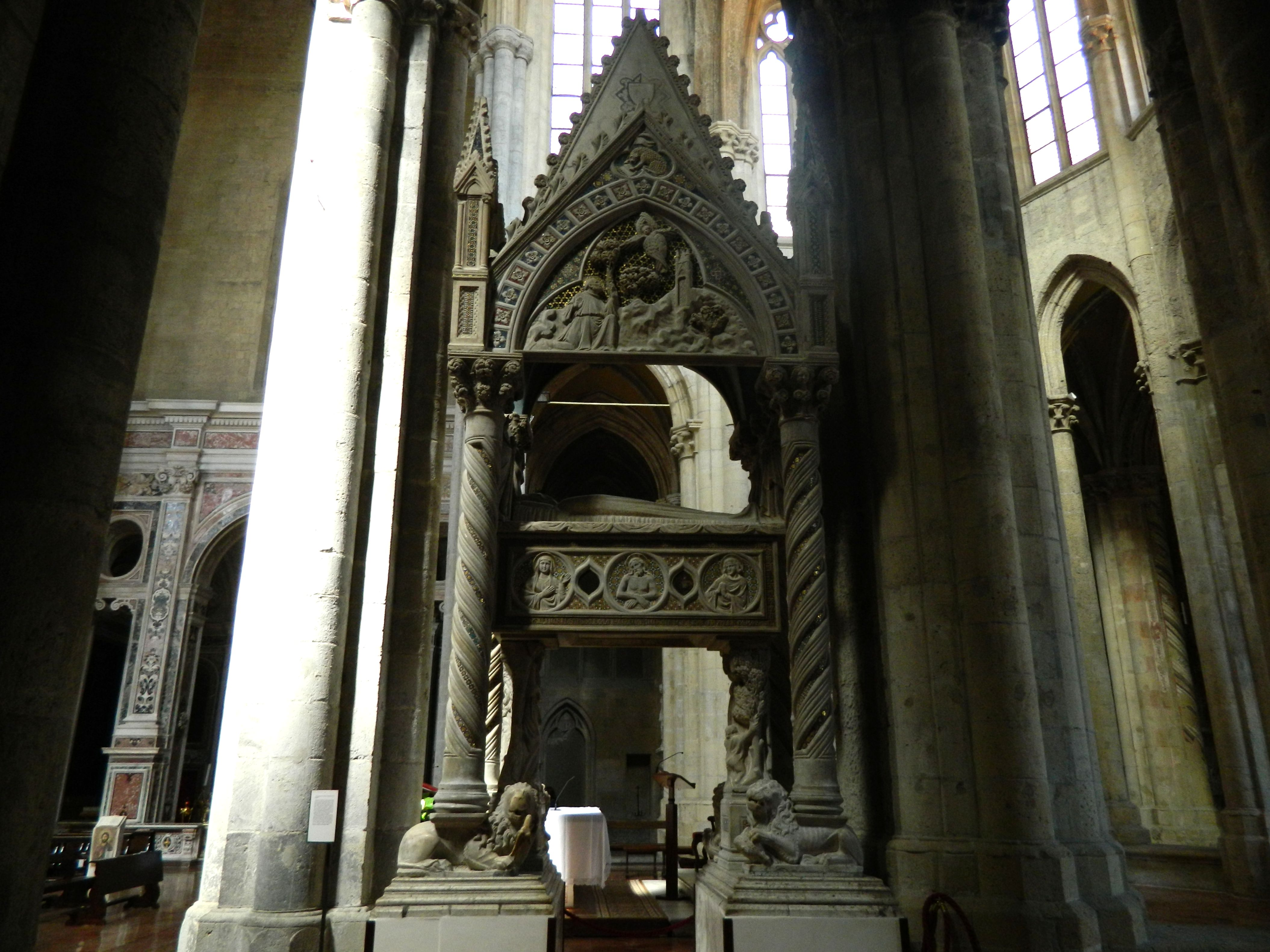 Sepolcro di Caterina d'Austria - XIV sec., Tino di Camaino, basilica di San Lorenzo Maggiore (Napoli)